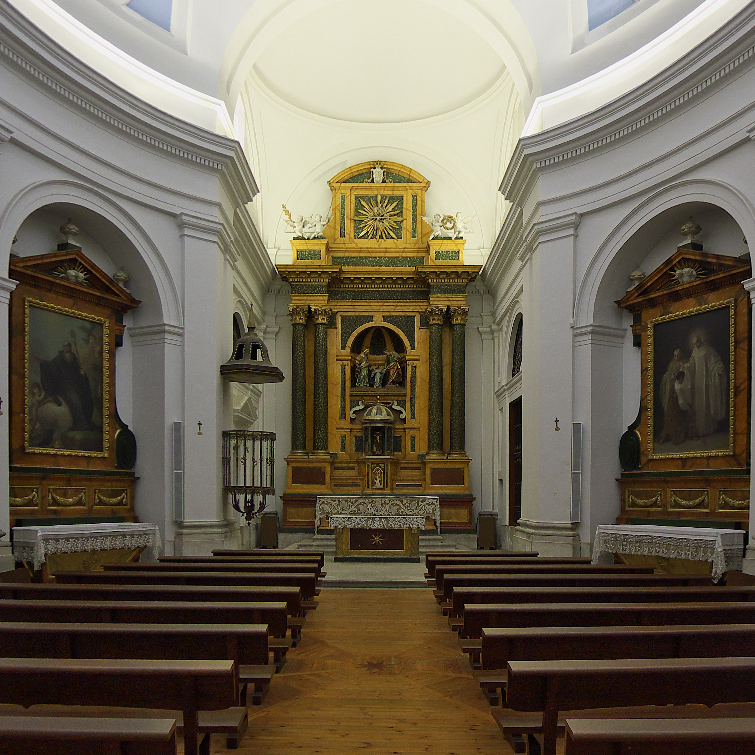 Francisco Sabatini proyecta la nueva iglesia del monasterio (1778)